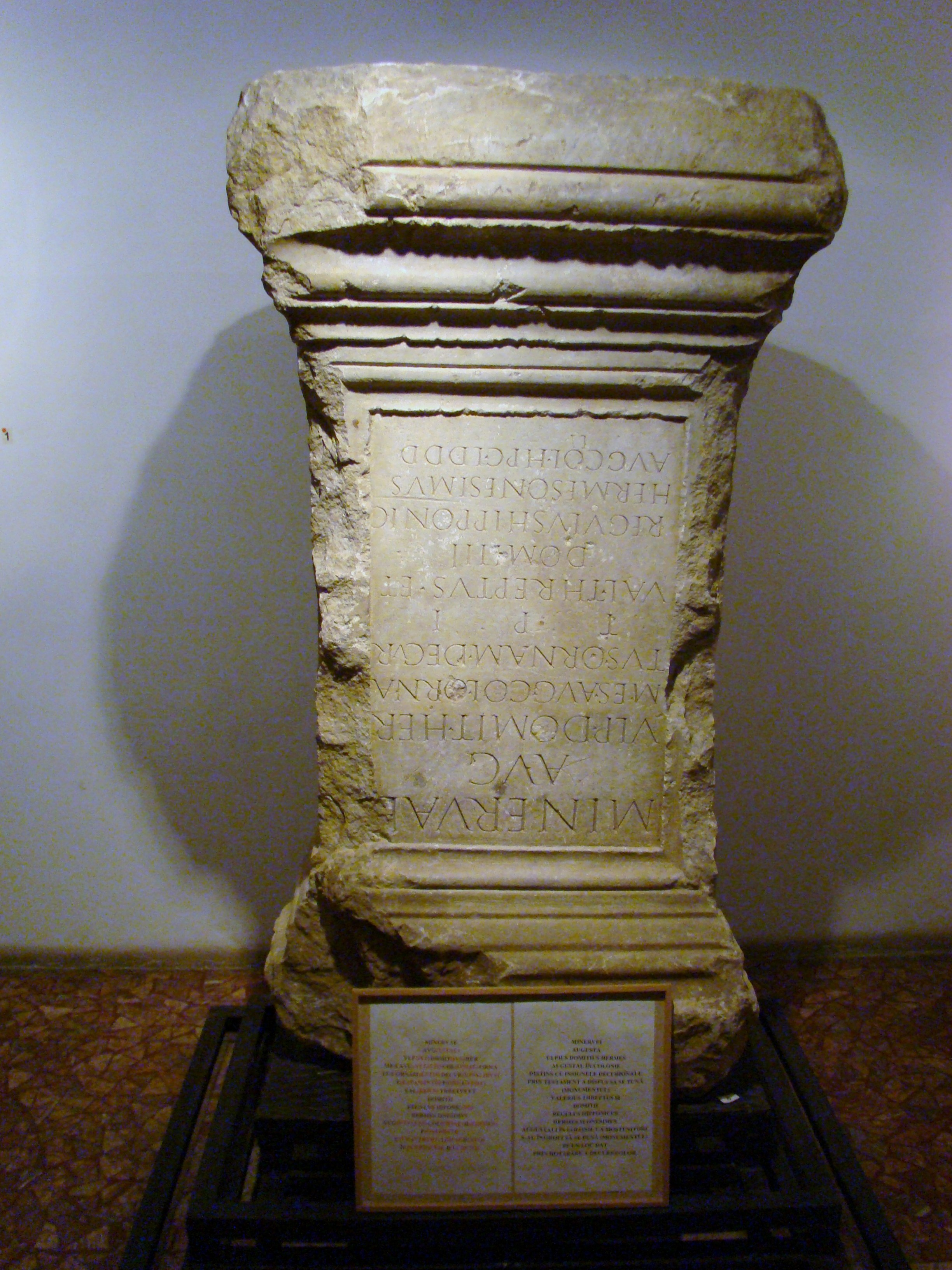 Biserica de lemn din Mintia, Hunedoara, mutată în incinta Muzeului Țăranului Român din București